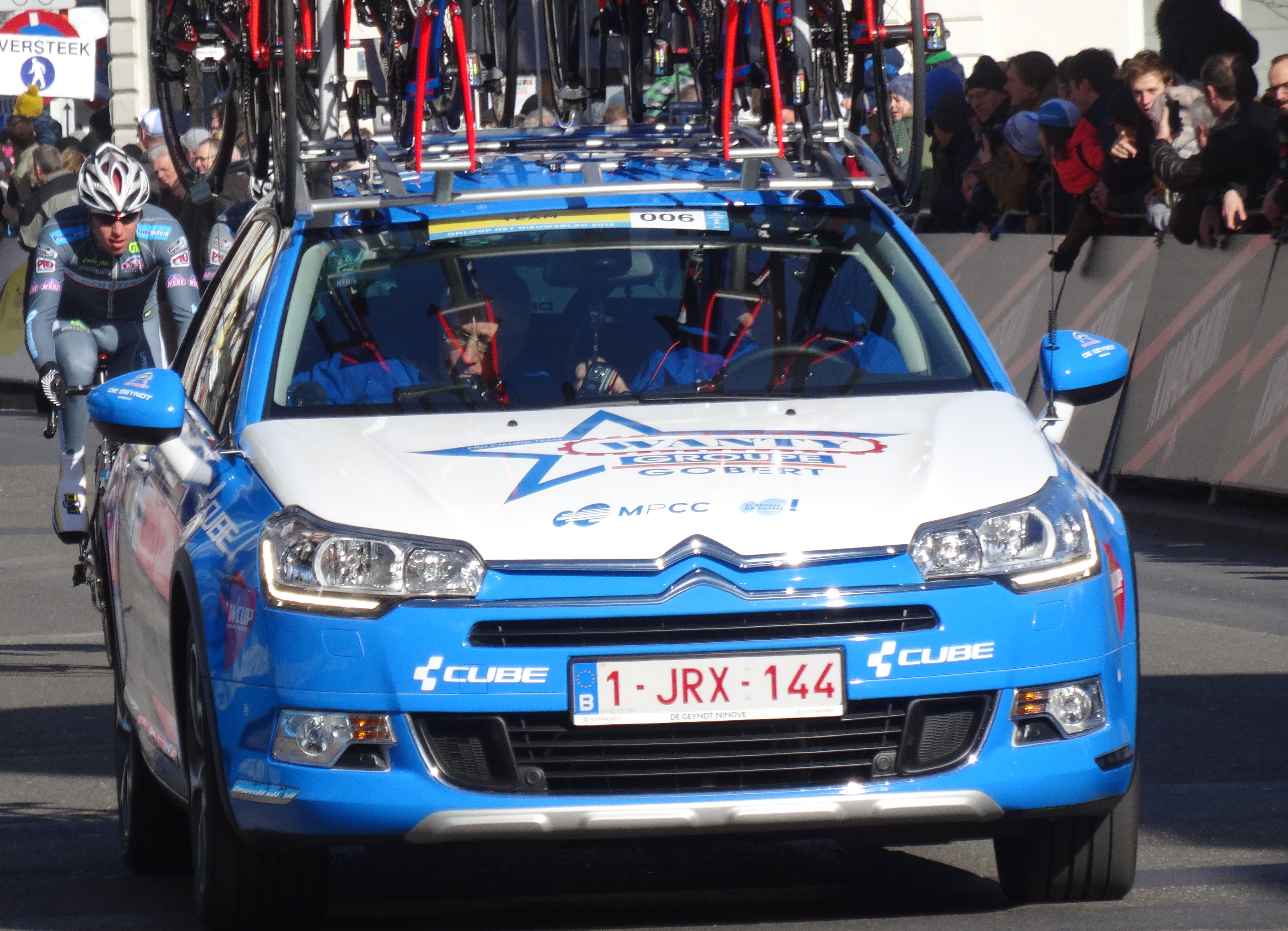 Reportage réalisé le samedi 28 février à l'occasion du départ et de l'arrivée du Circuit Het Nieuwsblad 2015 à Gand, Belgique.